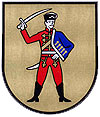 Wappen der Gemeinde Unterwart